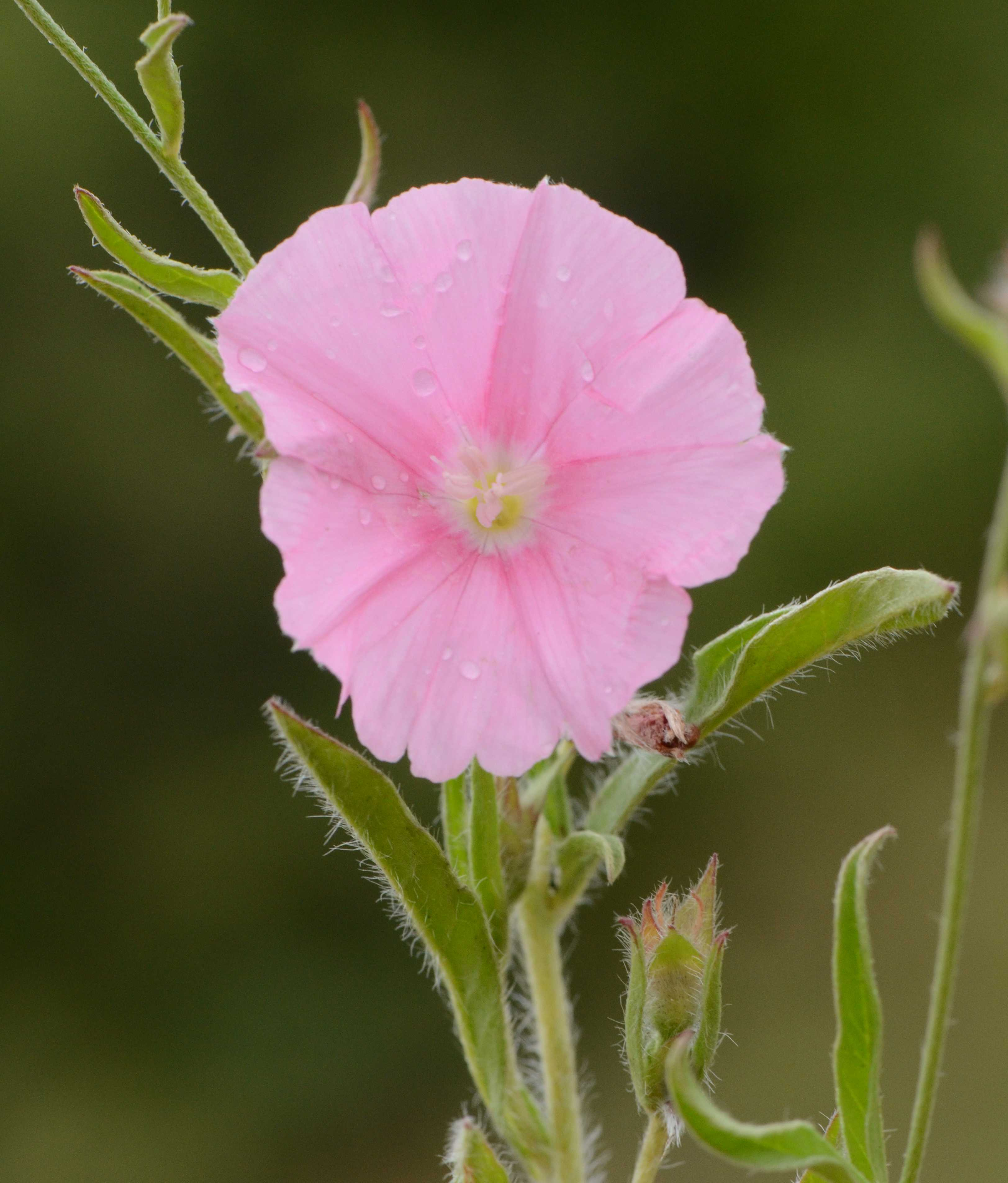 Convolvulus cantabrica, Soubérac, Charente, France